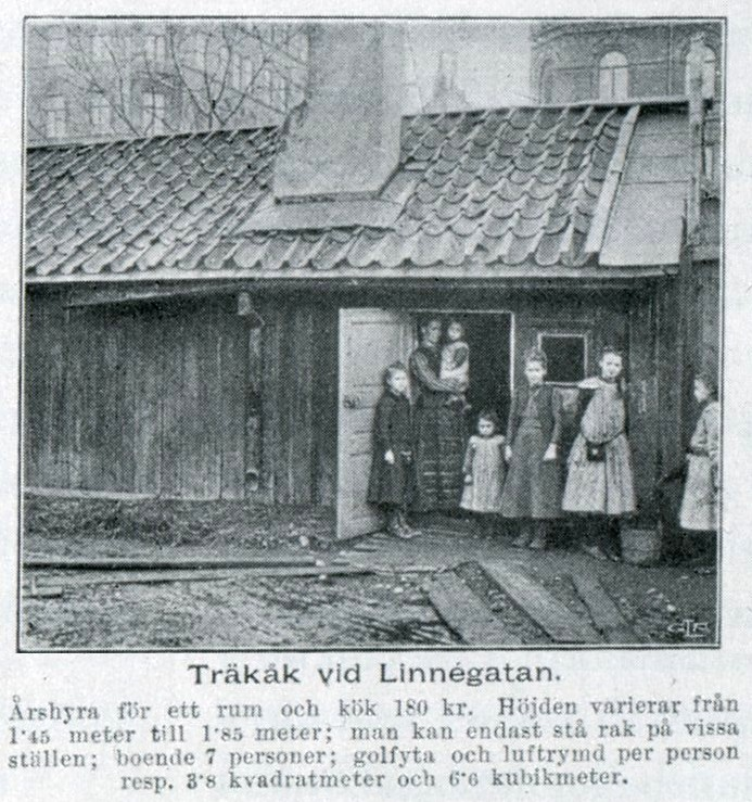 Träkåk vid Linnégatan med sju boende, bostadsnöd i Stockholm 1903.